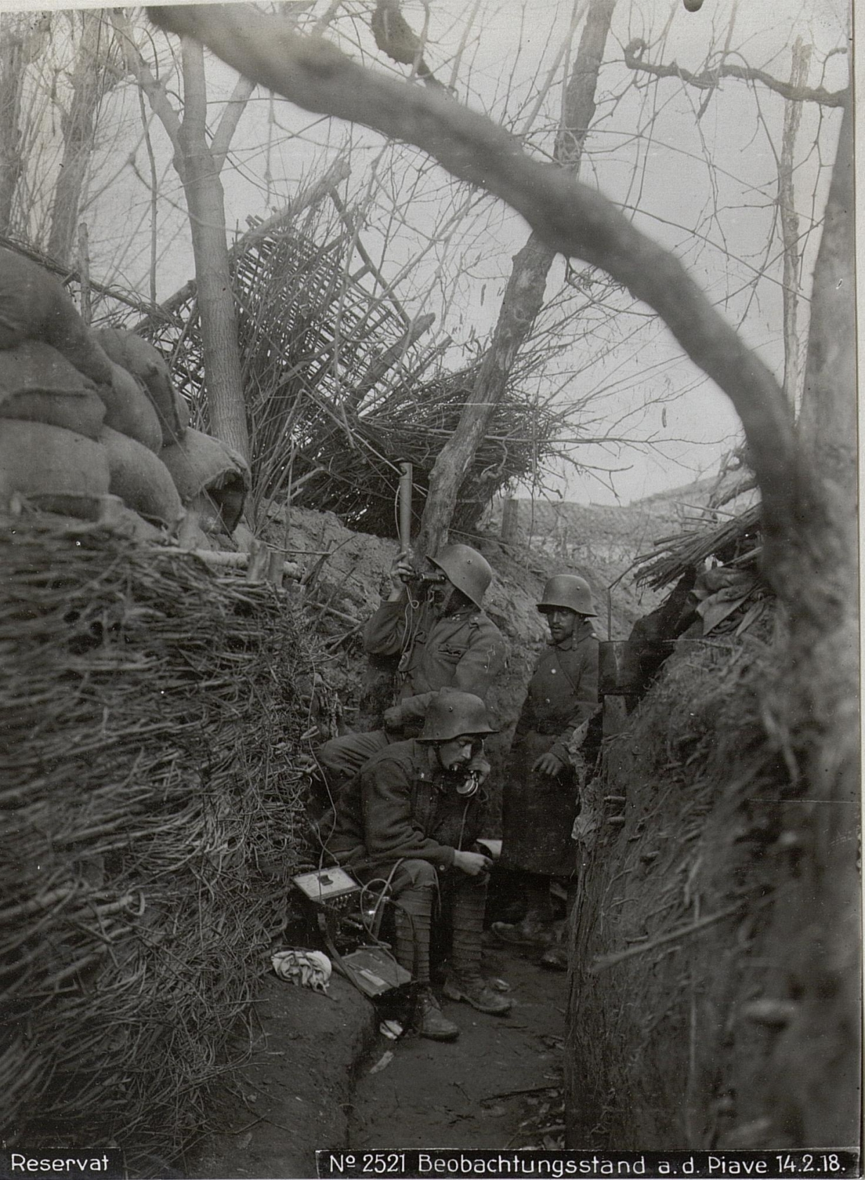 Beobachtungsstand a.d. Piave 14.2.18.